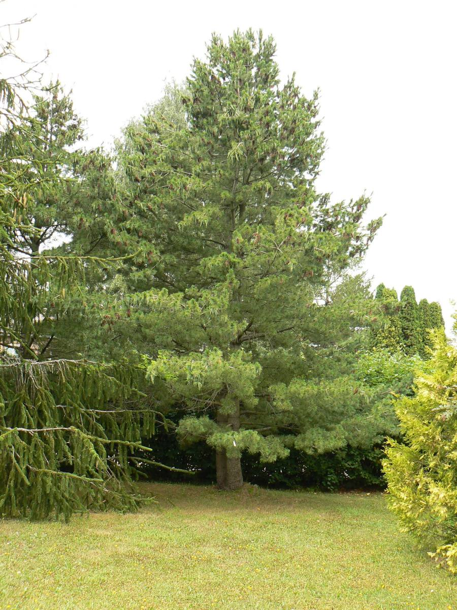 Rumeelia mänd (Pinus peuce) Tartu puukooli pargis